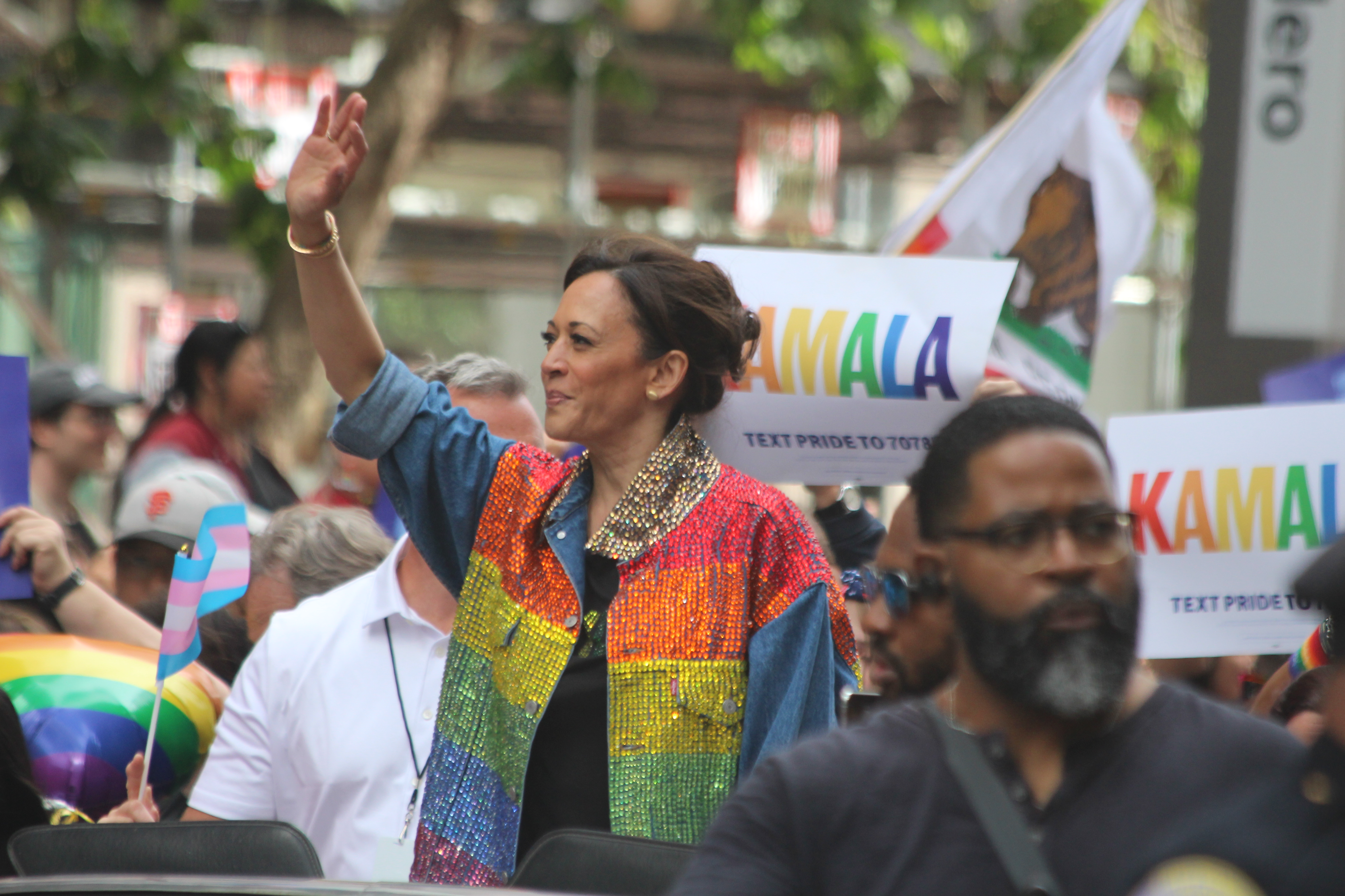 Kamala Harris